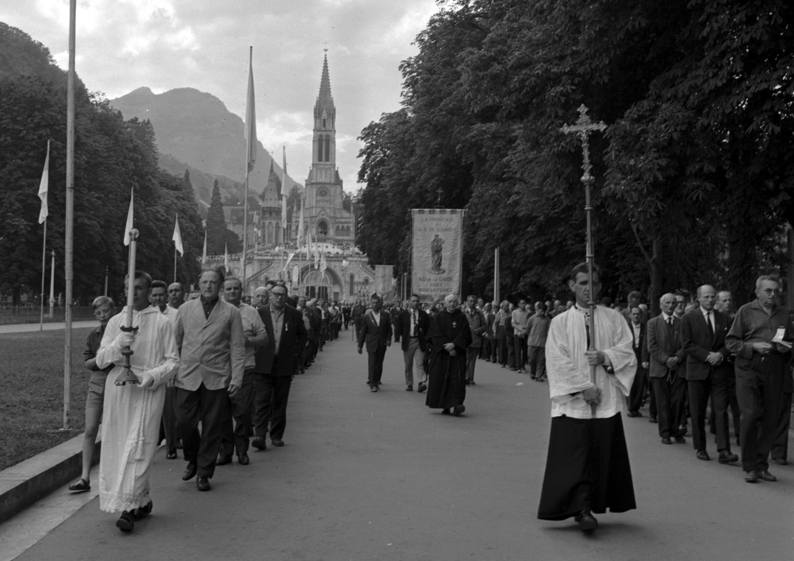 Lourdes (Hautes-Pyrénées). Août 1964. Vue d'une cérémonie religieuse dans le sanctuaire de Lourdes. Observation: Photographie réalisée pour l'ouvrage de André Rimailho, "Quelqu'un à Lourdes" publié en juin 1965 aux Editions du Centurion.